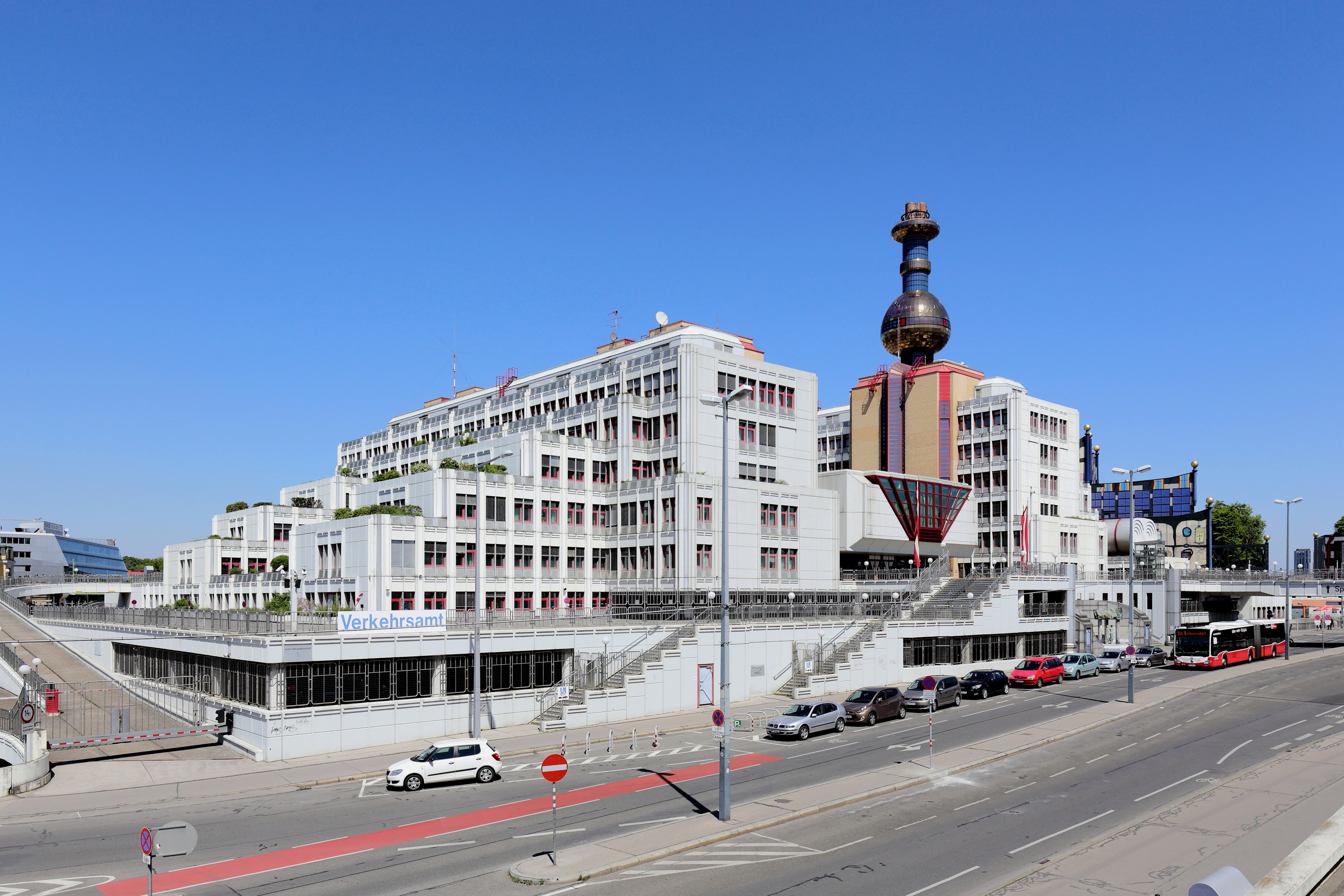 Südwestansicht des Bundesamtsgebäude am Josef-Holaubek-Platz im 9. Wiener Gemeindebezirk Alsergrund und im Hintergrund die Müllverbrennungsanlage Spittelau mit der von Hundertwasser künstlerisch gestalteten Fassaden.Das Gebäude wurde im Zuge der Überbauung der Gleisanlagen des Franz-Josefs-Bahnhofs von 1986 bis 1989 nach Entwürfen von Kurt Hlaweniczka und Peter Czernin als Bundesamtsgebäude Liechtenwerderplatz errichtet.Im Gebäudekomplex sind das Verkehrsamt der Landespolizeidirektion Wien sowie zahlreiche weitere Dienststellen der Landespolizeidirektion untergebracht und dient als Hauptsitz des Bundeskriminalamtes.